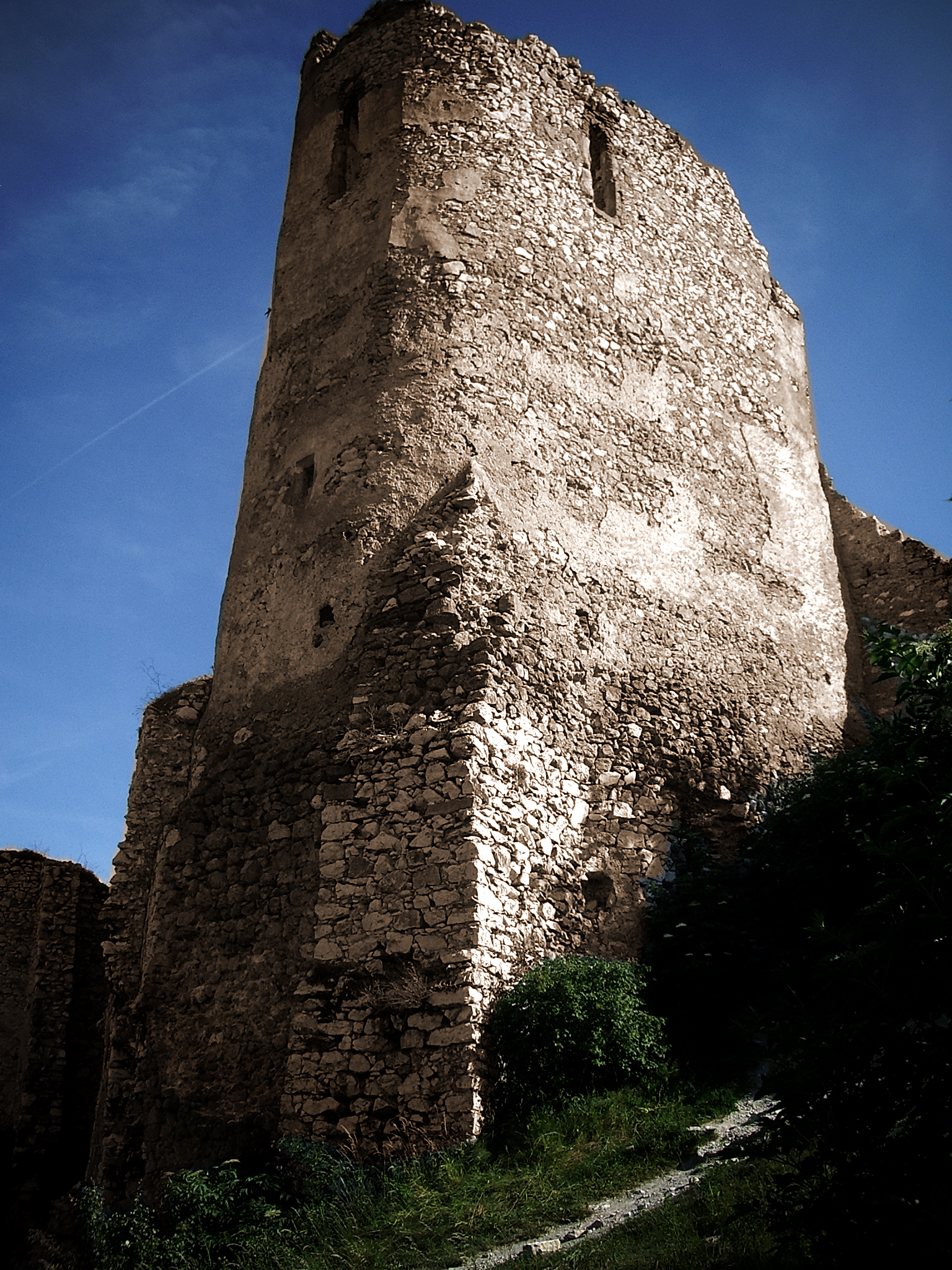 Čachtický hrad